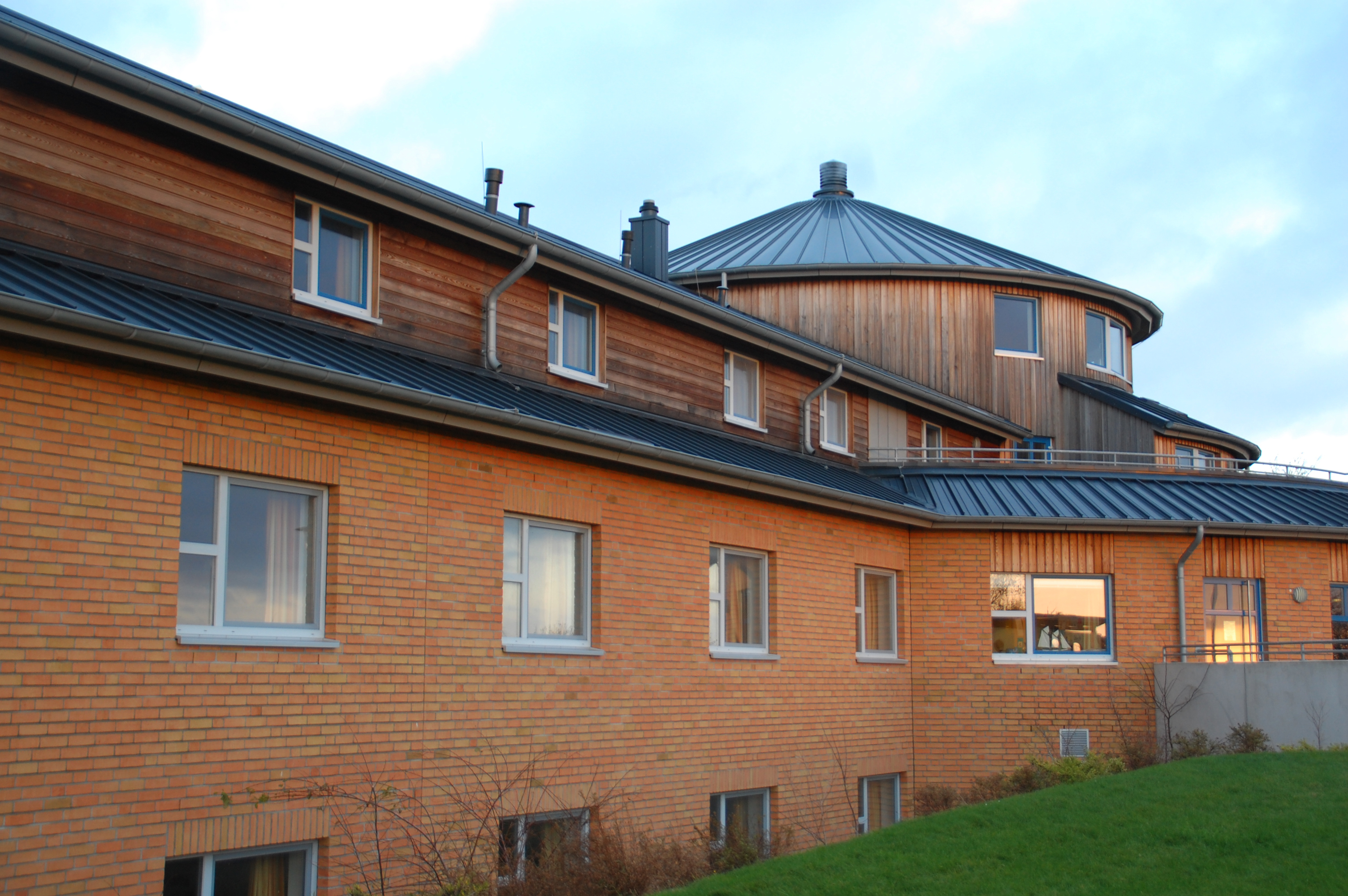 DJH-Jugendherberge in Dahme, Holstein; Impression